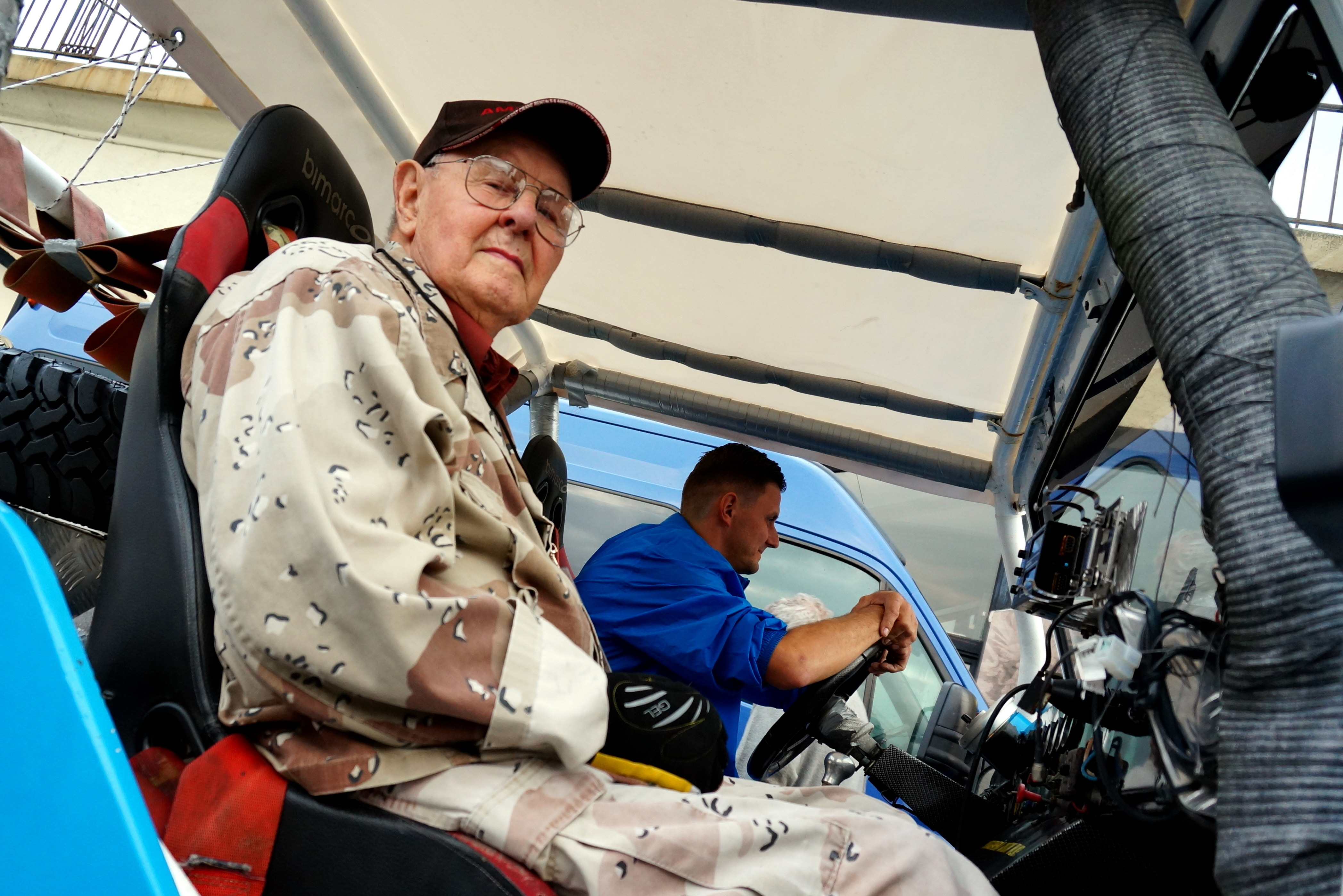 Stanisław Lisowski ( 1929 - 2015 ), legendarny gorzowski kierowca rajdowy, wielokrotny mistrz Polski w rajdach samochodów terenowych. Na zdjęciu ostatni raz prezentuje się publicznie w swoim " Merlisie 3000 ", podczas Moto Racing Show w 2014 r.